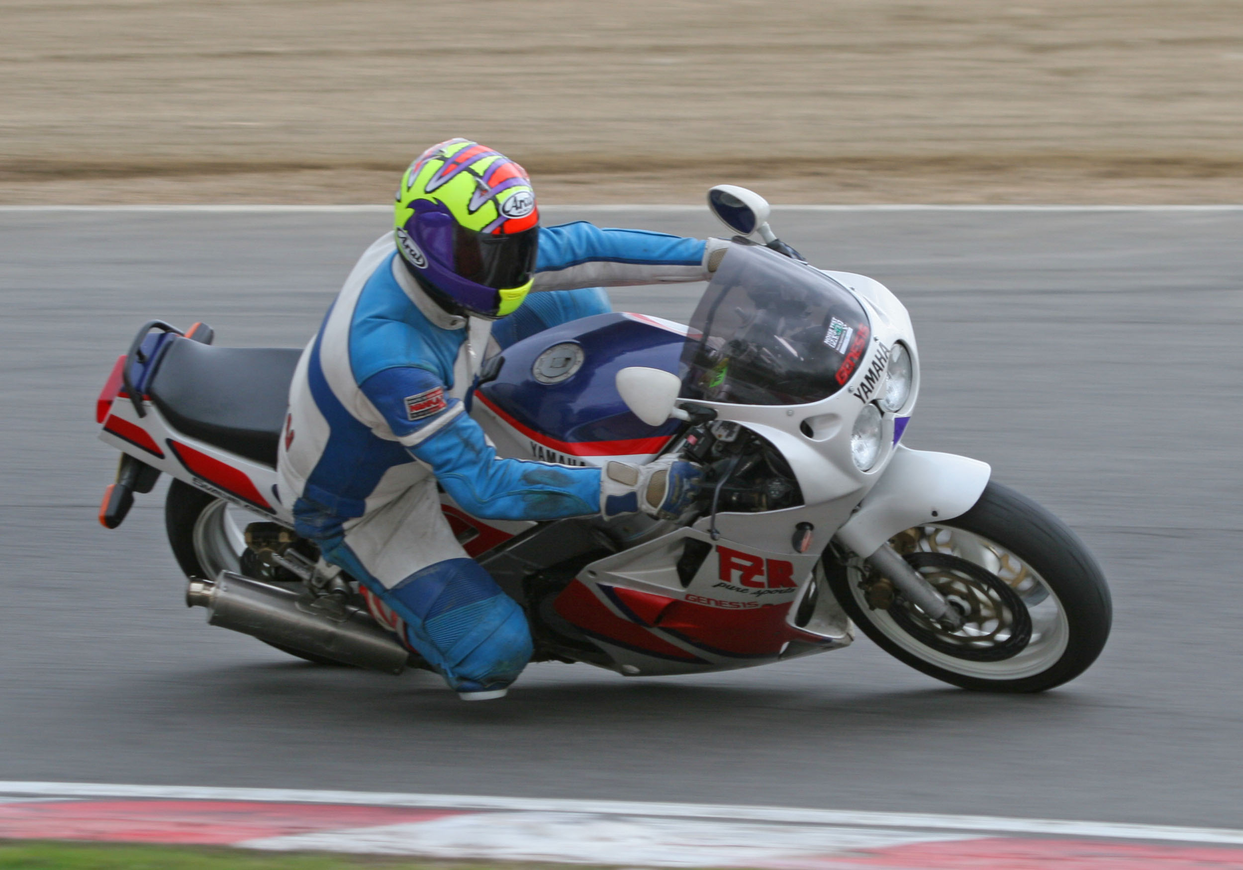 Yamaha FZR 750R Genesis @ Brands Hatch Bikers' Track Day